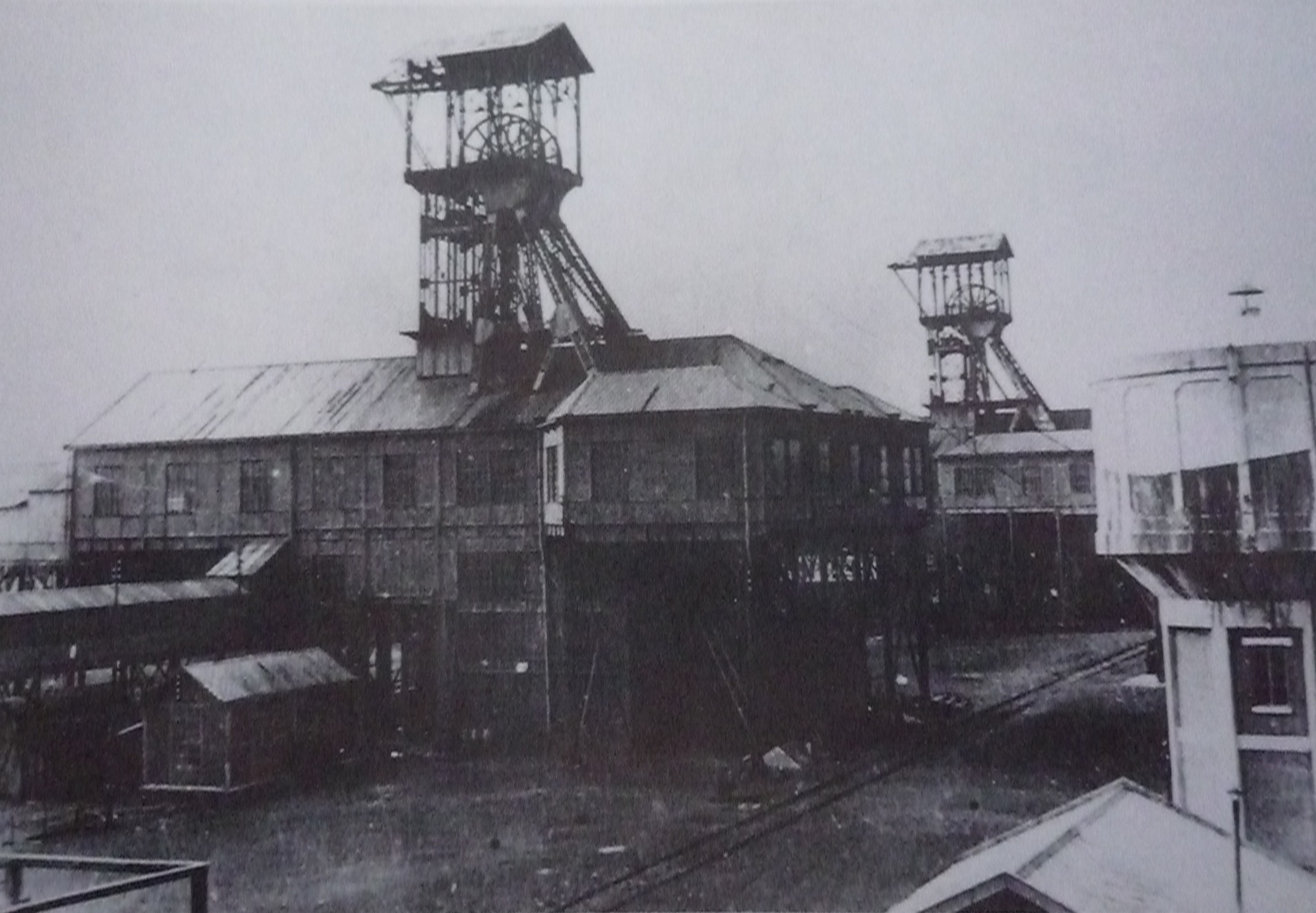 La Fosse n° 6 bis - 6 ter de la Compagnie des mines de Marles était un charbonnage constitué de deux puits situé à Calonne-Ricouart, Pas-de-Calais, Nord-Pas-de-Calais, France.